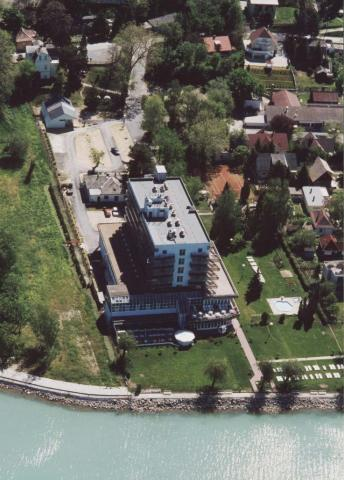 Balatonvilágos.